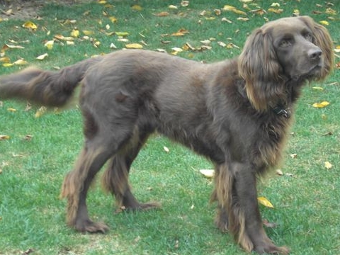 Deutsch Langhaar Ero Stellfelde